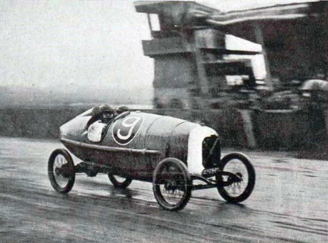 Robert Benoist gagnant du Grand Prix de l'U.M.F. Cyclecars du Mans en 1922, sur Salmson VAL - Le Sport Universel Illustré du 22 septembre 1922, p.362